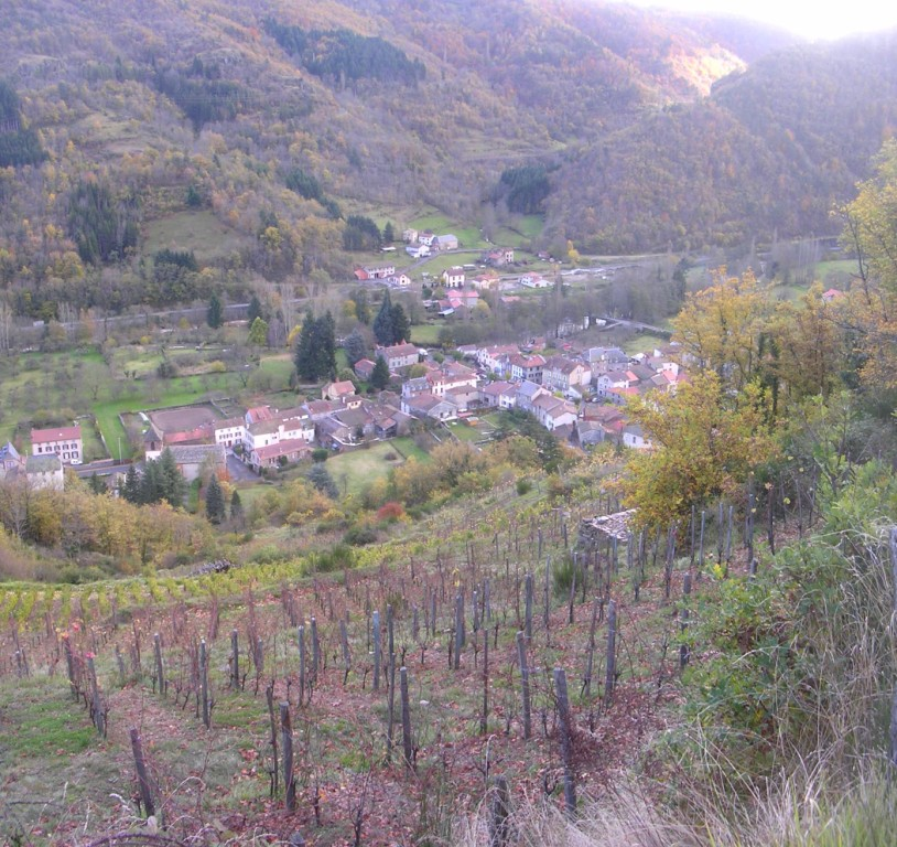 Vue sur Molompize (15 - France) et sa vallée